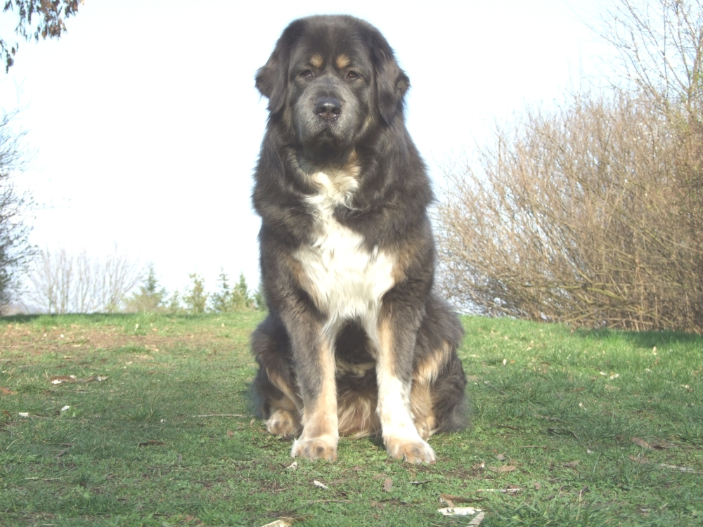 fenka Tibetské dogy, 3 roky